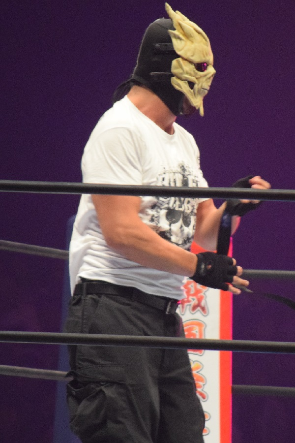 2016年11月5日 大阪府立体育会館「POWER STRUGGLE」 BONE SOLDIER